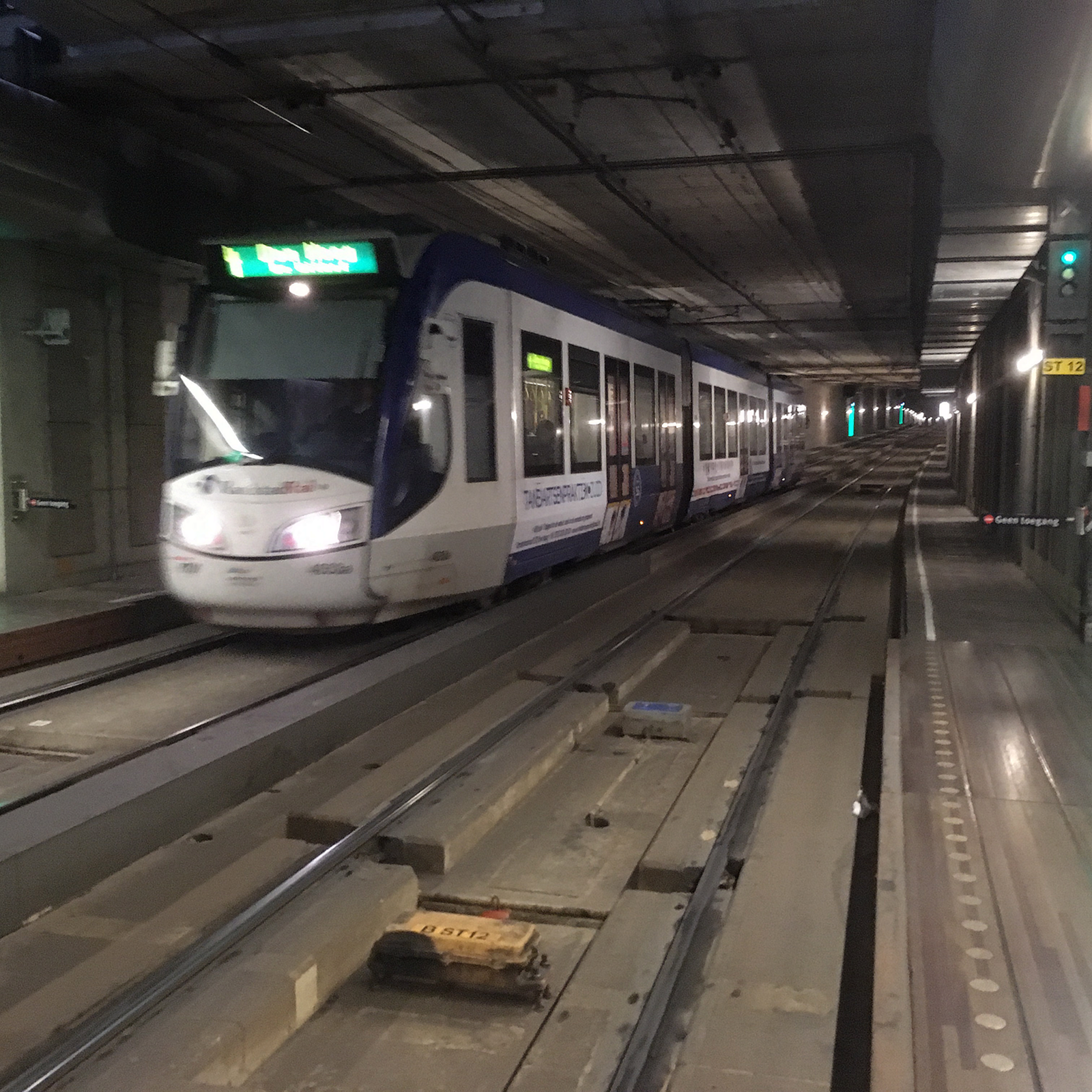 Tram Tunnel onder de Grote Marktstraat in Den Haag, gezien vanaf de halte Grote Marktstraat richting Centraal Station